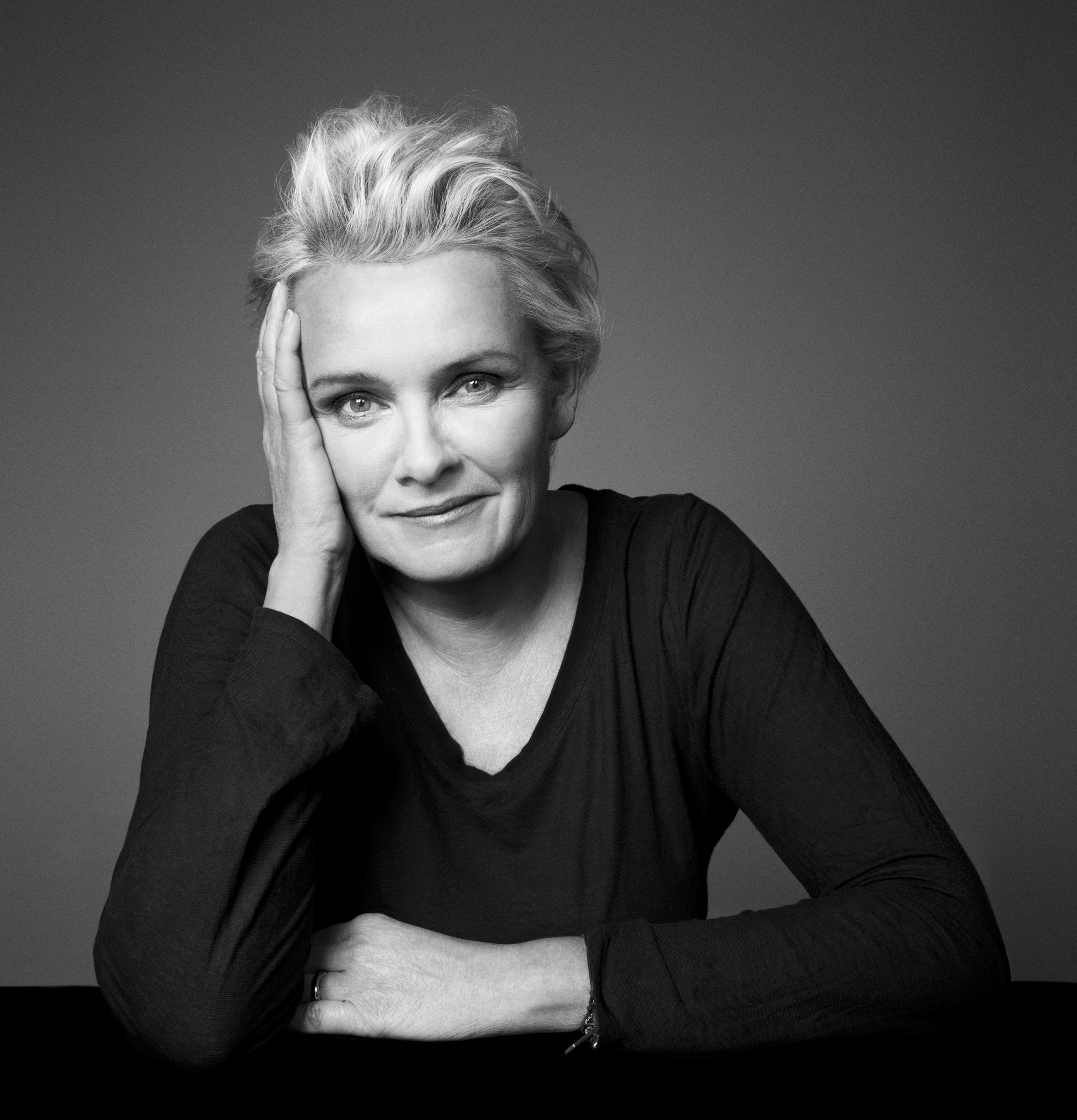 Artisten Eva Dahlgren.